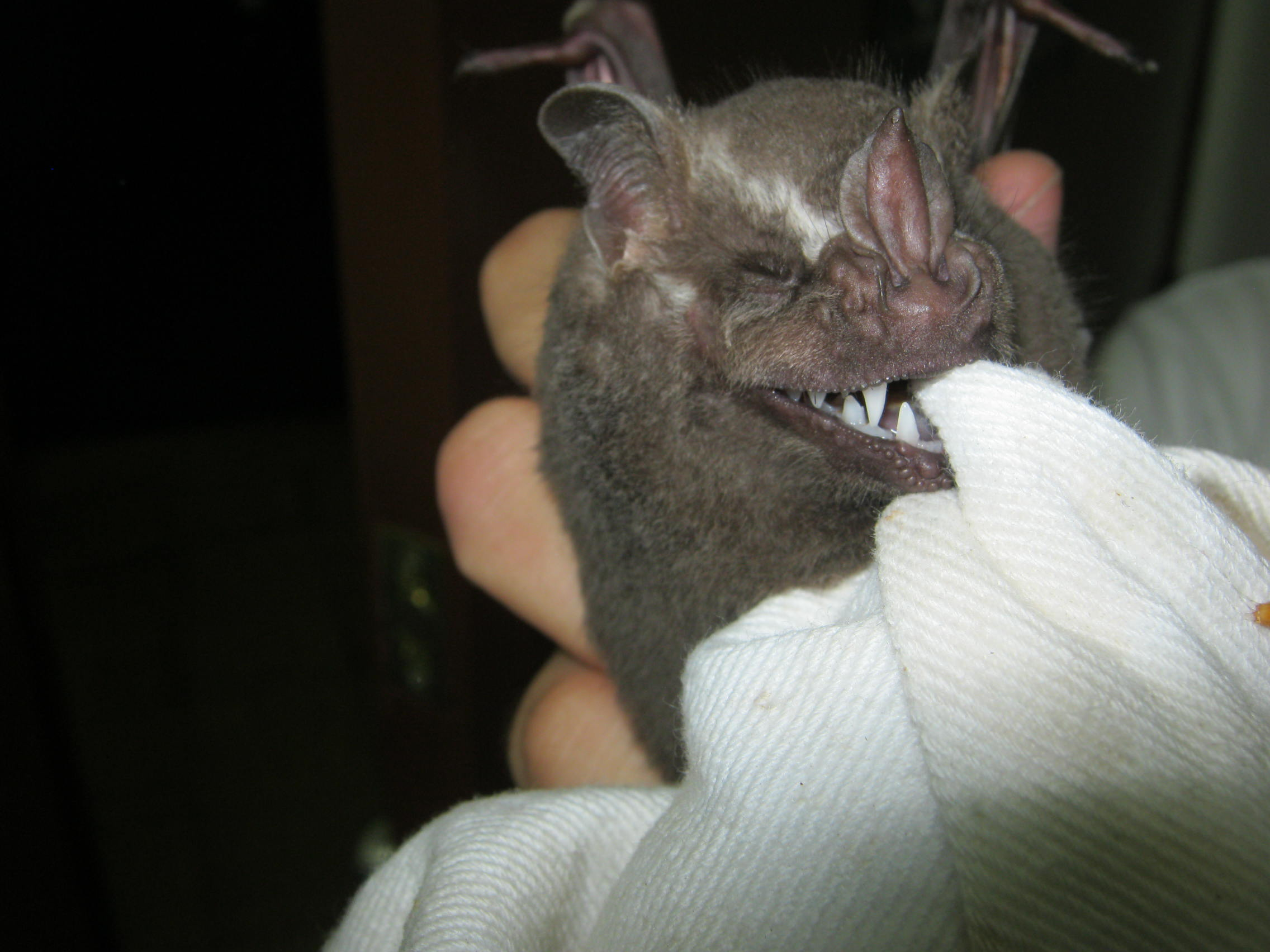 Ejemplar de Artibeus lituratus, capturado en las instalaciones de la microestación de la UnivalleEsperanto: Ekzemplero de Artibeus lituratus kaptita en la Univalo